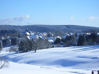 Schmiedefeld am Rennsteig im Winter